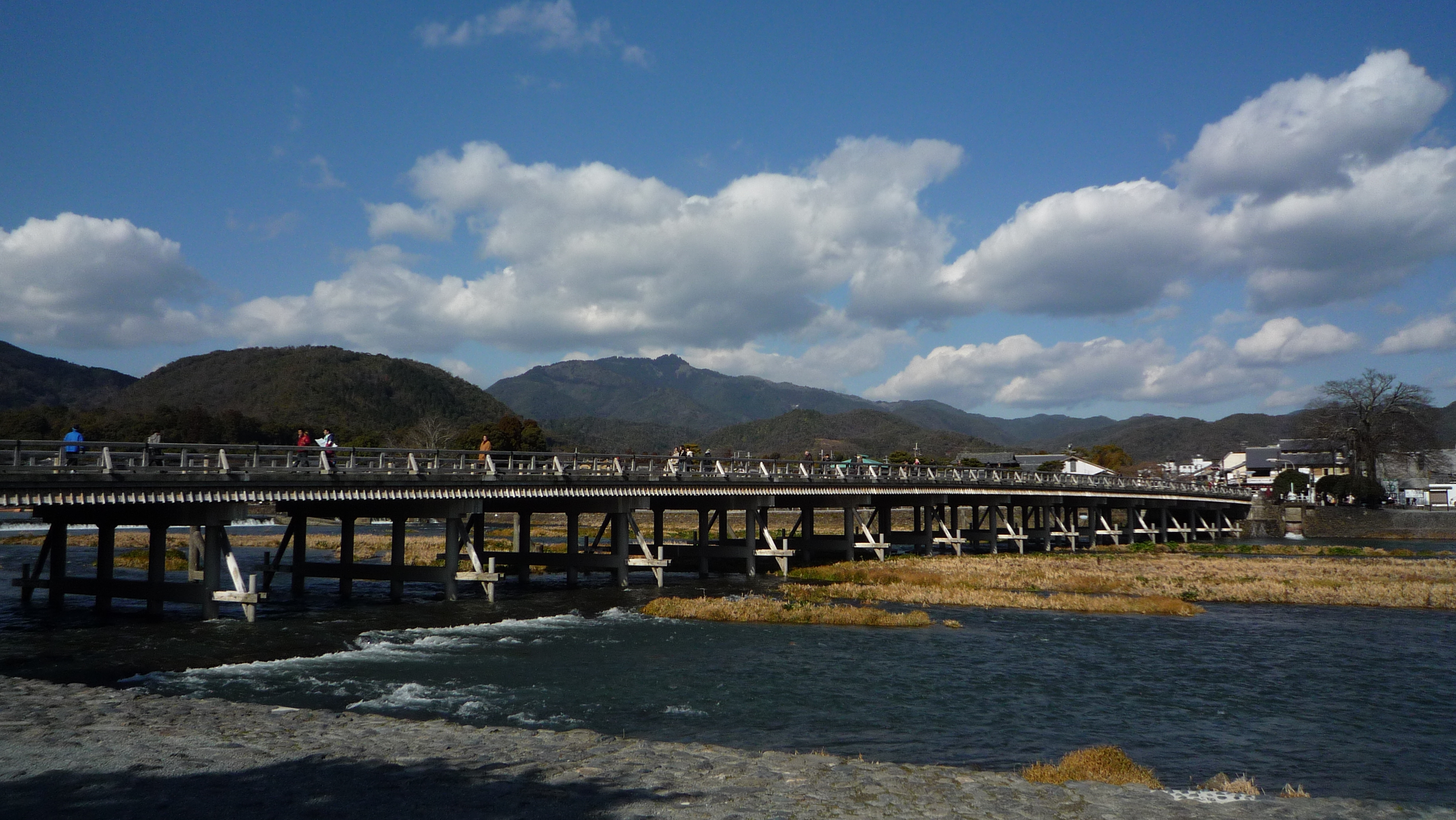 渡月橋